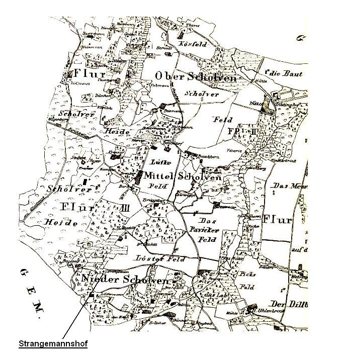 Gemeindecharte Buer, aufgenommen in den Jahren 1822/23 durch den Kat. Geomet. Doellinger